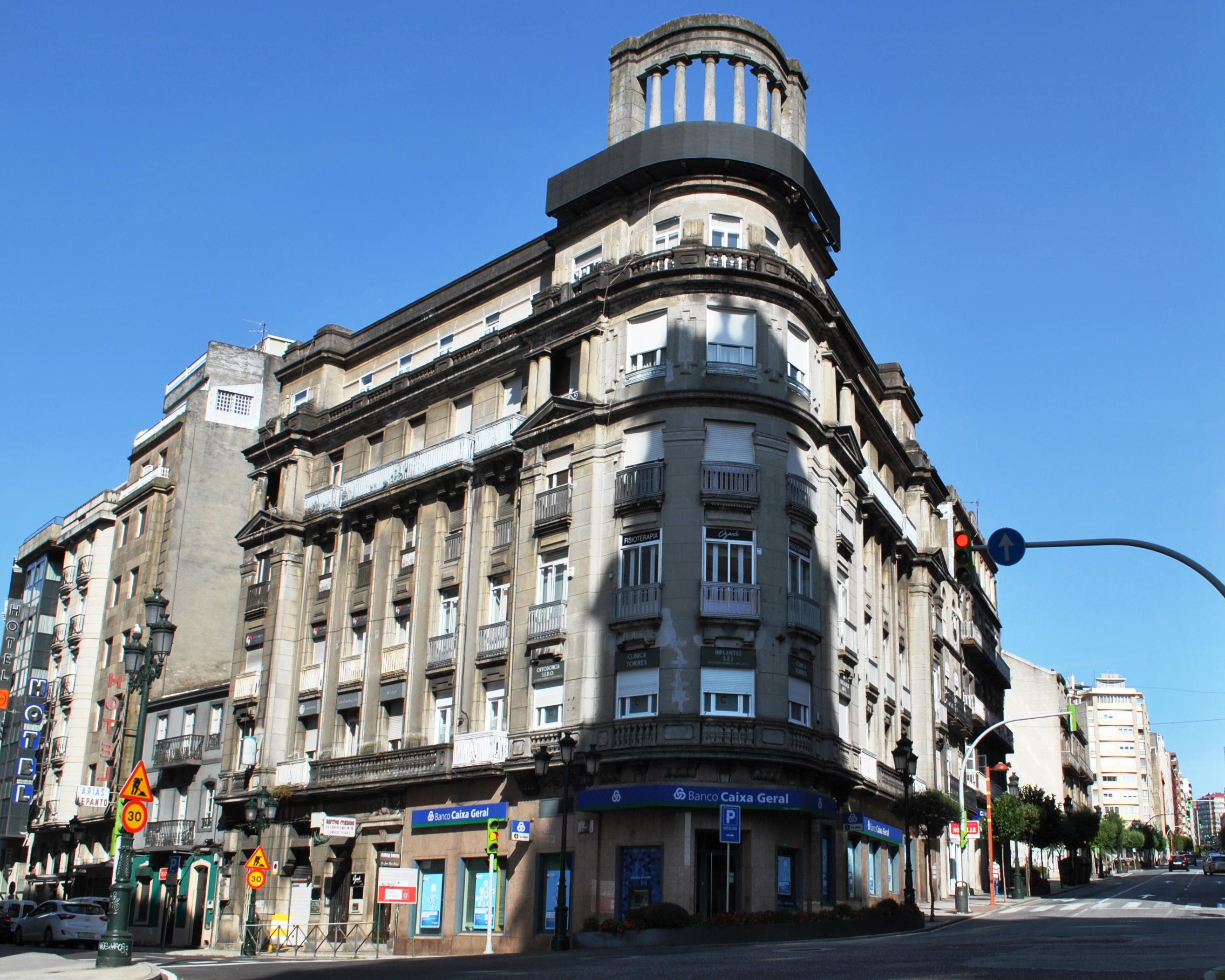 Véxase o título e as categorías.